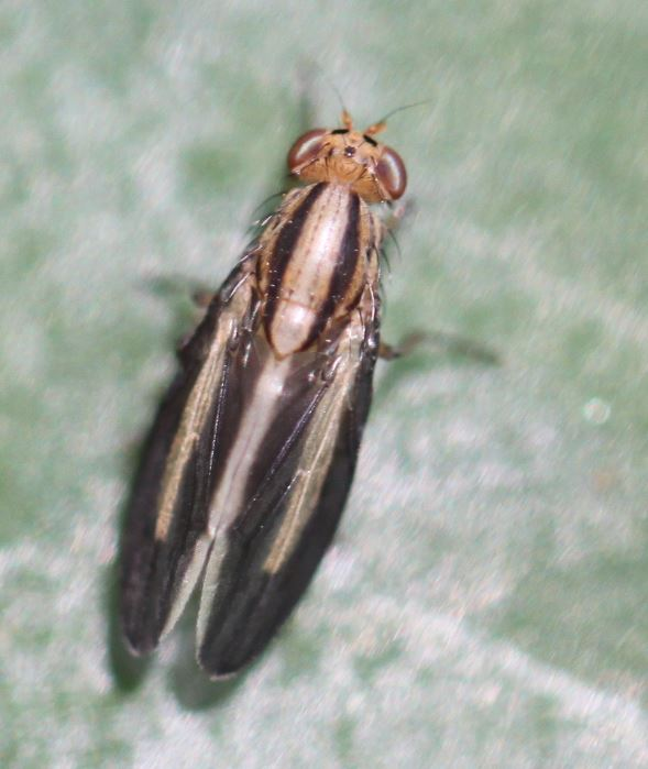 Peplomyza discoidea am 6. Mai 2019 in einem Wald nahe Walldorf/Baden